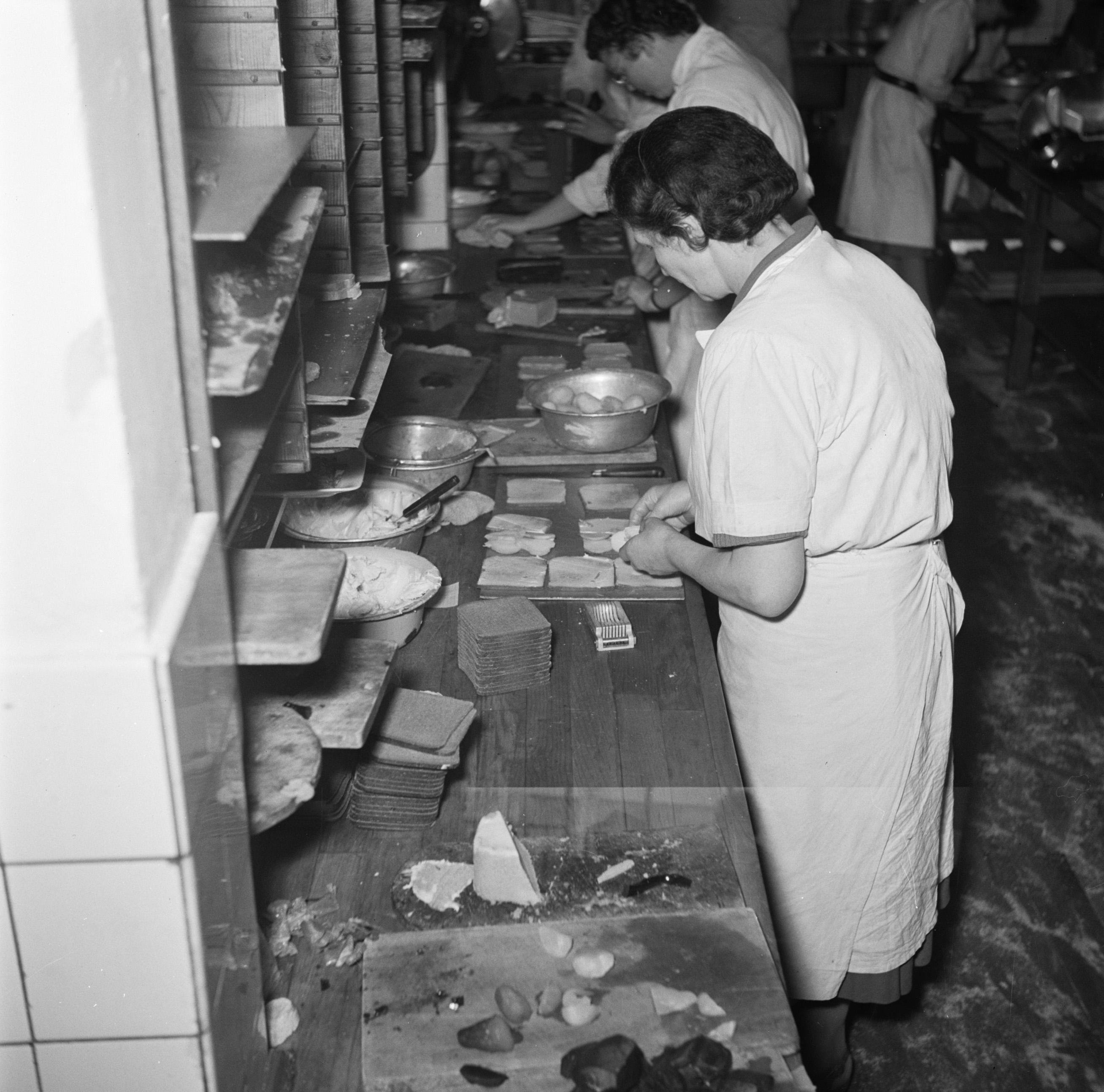 Collectie / Archief : Fotocollectie Van de Poll Reportage / Serie : Smørrebrød restaurant Oskar Davidsen Beschrijving : Koks in een productie keuken bereiden grote hoeveelheden smørrebrød Datum : maart 1954 Locatie : Denemarken, Kopenhagen Trefwoorden : brood, broodbeleg, keukens, koks, maaltijden, voedselbereiding Fotograaf : Poll, Willem van de, [onbekend] Auteursrechthebbende : Nationaal Archief Materiaalsoort : Negatief (zwart/wit) Nummer archiefinventaris : bekijk toegang 2.24.14.02 Bestanddeelnummer : 252-9036